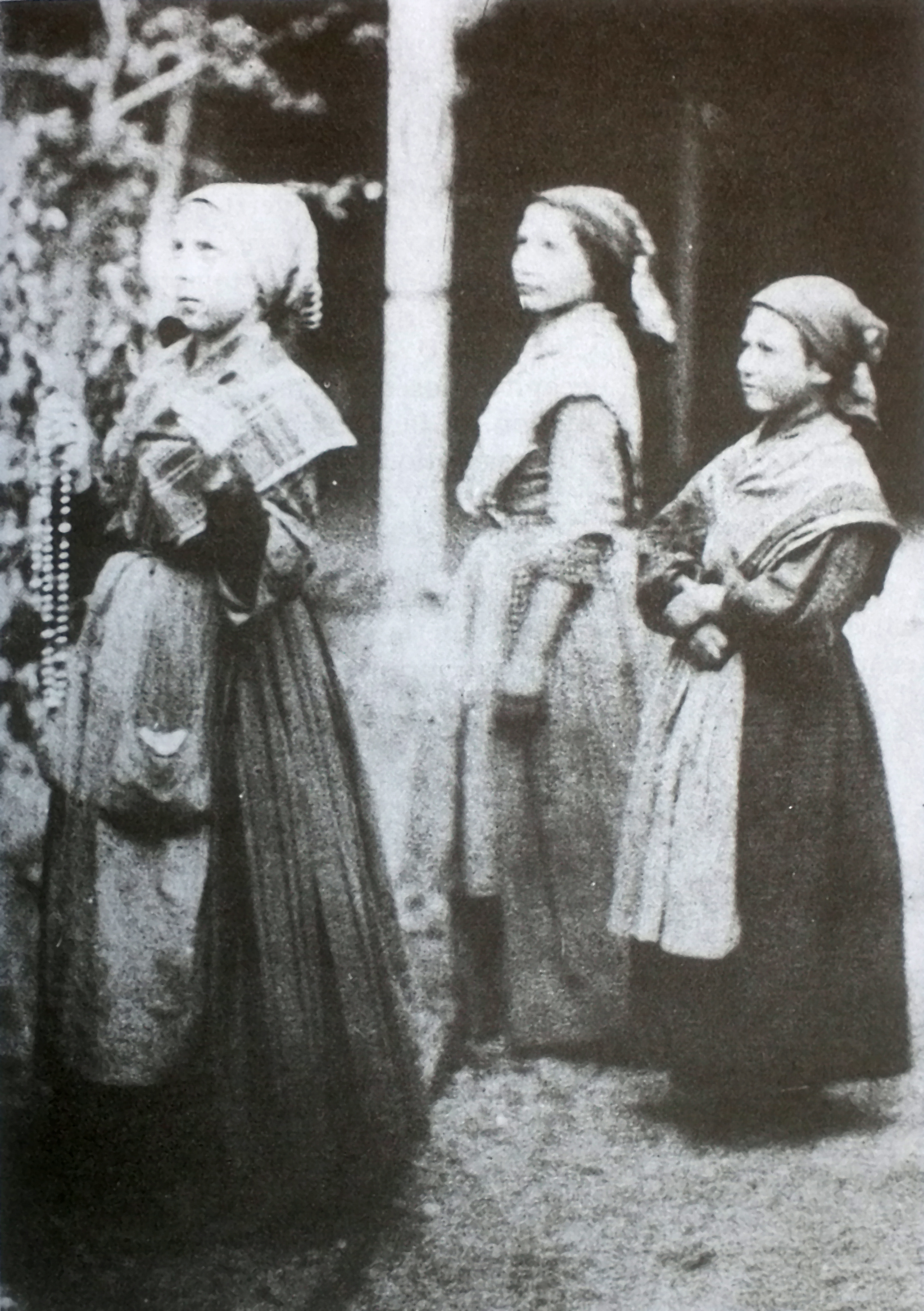 D'avril à juillet 1858, au moment des appartions à Bernadette Soubirous, Lourdes connaît une "épidémie de visionnaires".